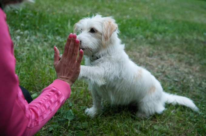 viis pihku